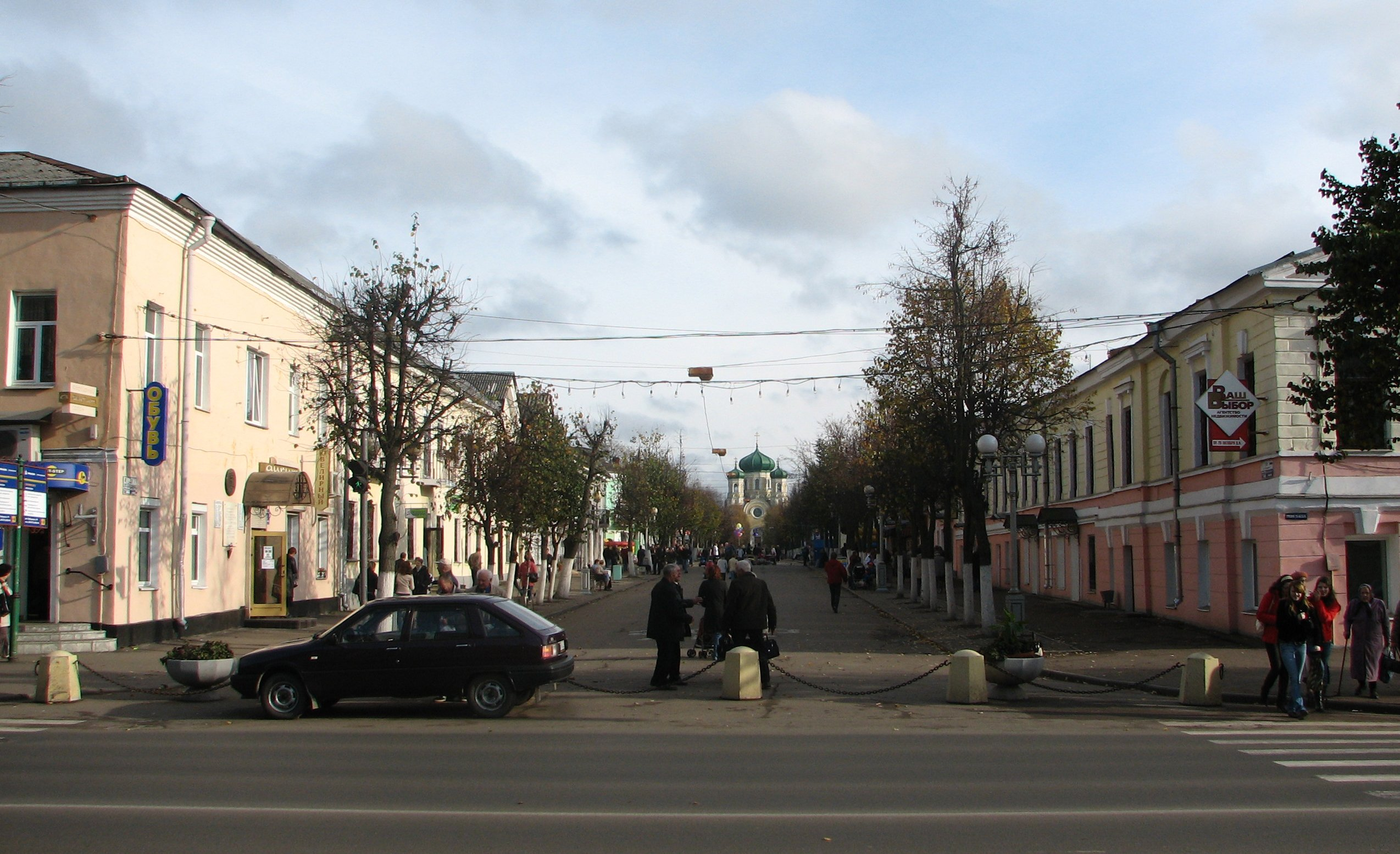 Соборная улица в Гатчине